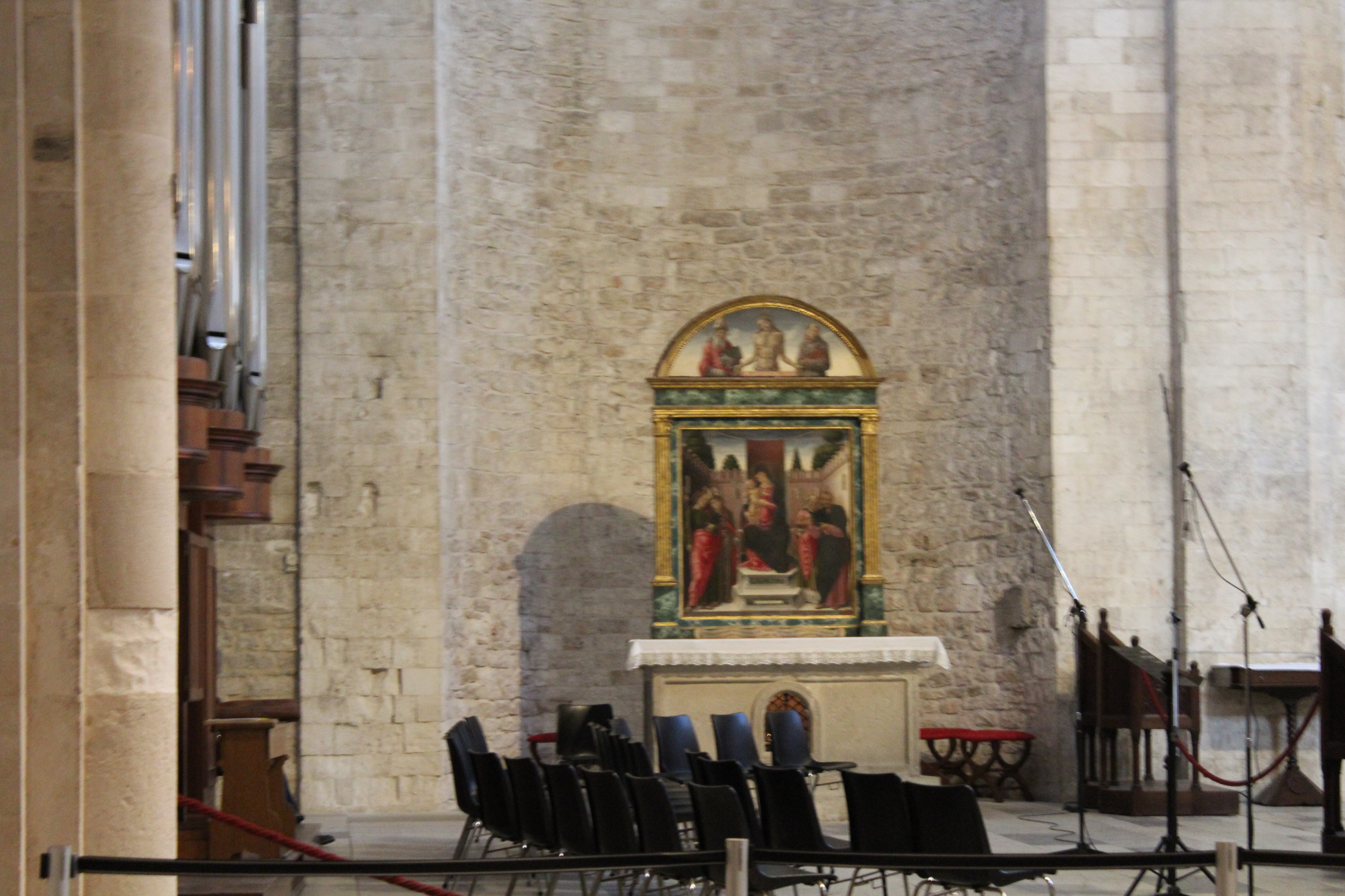 basilica di San Nicola This is a photo of a monument which is part of cultural heritage of Italy.